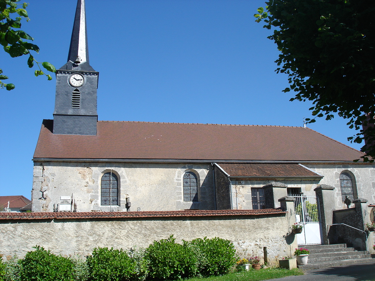 Eglise Notre Dame de l'Assomption (16e siècle) de Chaltrait, Marne, France